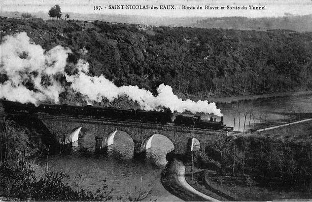 Train sur le pont de Gueltas, avant le tunnel de Castennec, vers 1900.